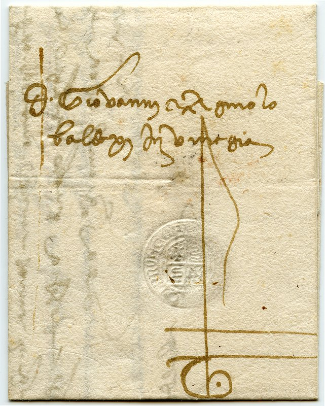 Brief befördert durch die Sforza vom 18.9.1458 aus Mailand